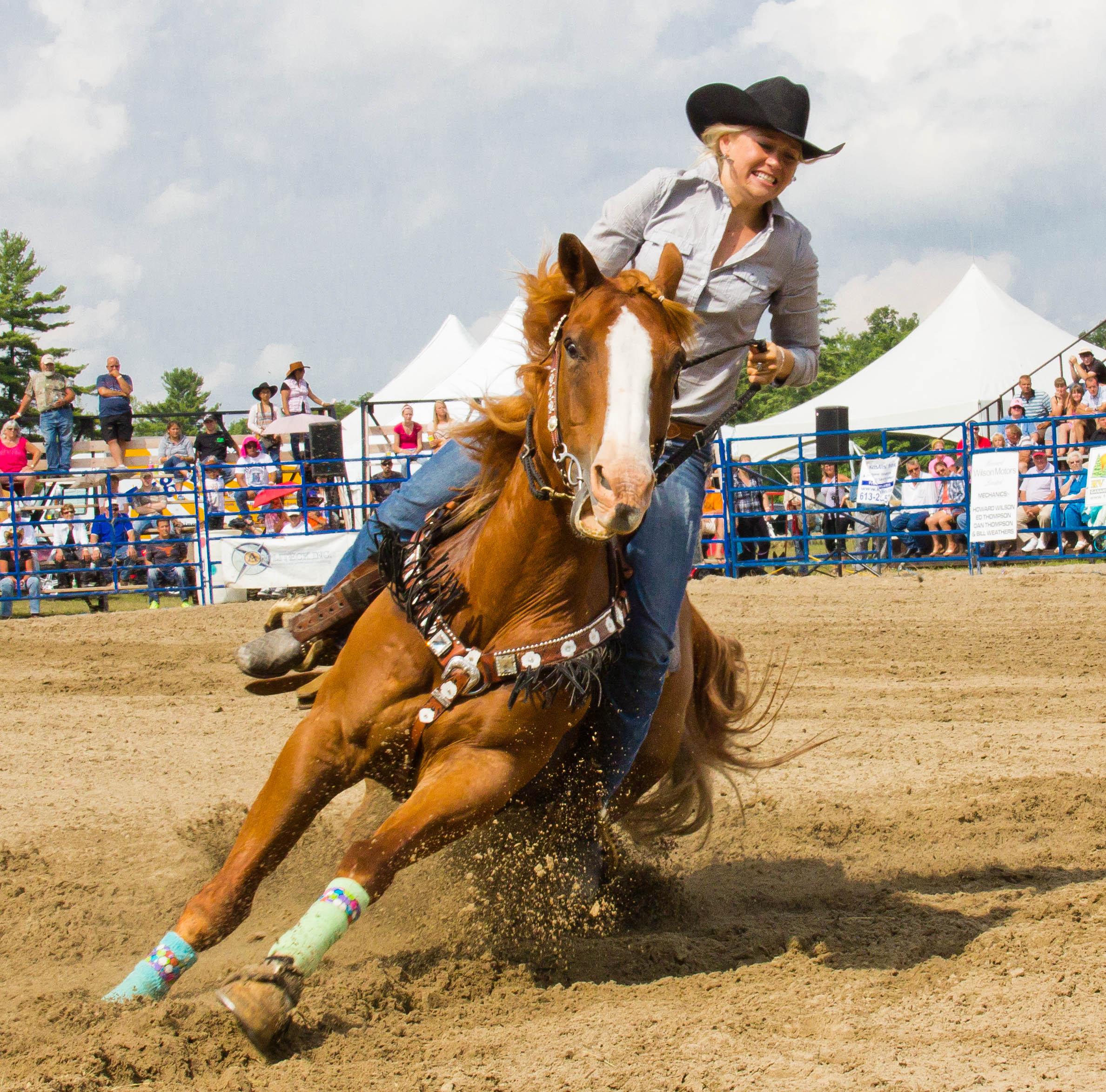 Rodeo, Spencerville, ON